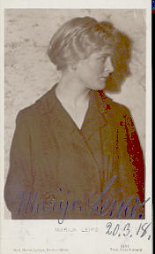 Marija Leiko (14 August 1887, Riga - 1937, Moscow), silent movie star